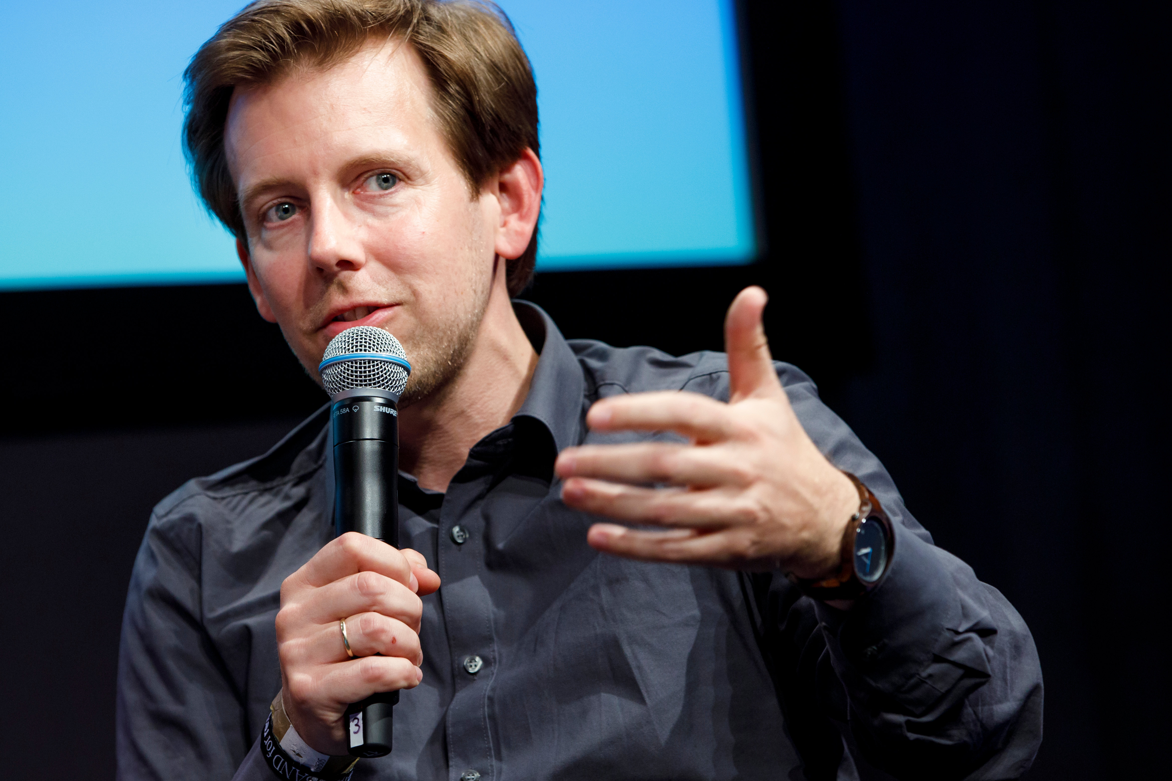 Session: Plattformen, die allen gehören Speaker: Claudia Henke, Magdalena Ziomek, Jan-Felix Schrape, Thomas Gegenhuber